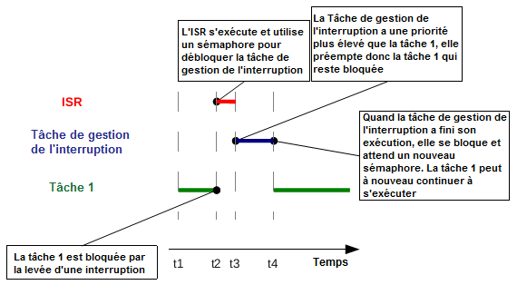 Schéma basique décrivant l'utilisation d'une interruption différé.